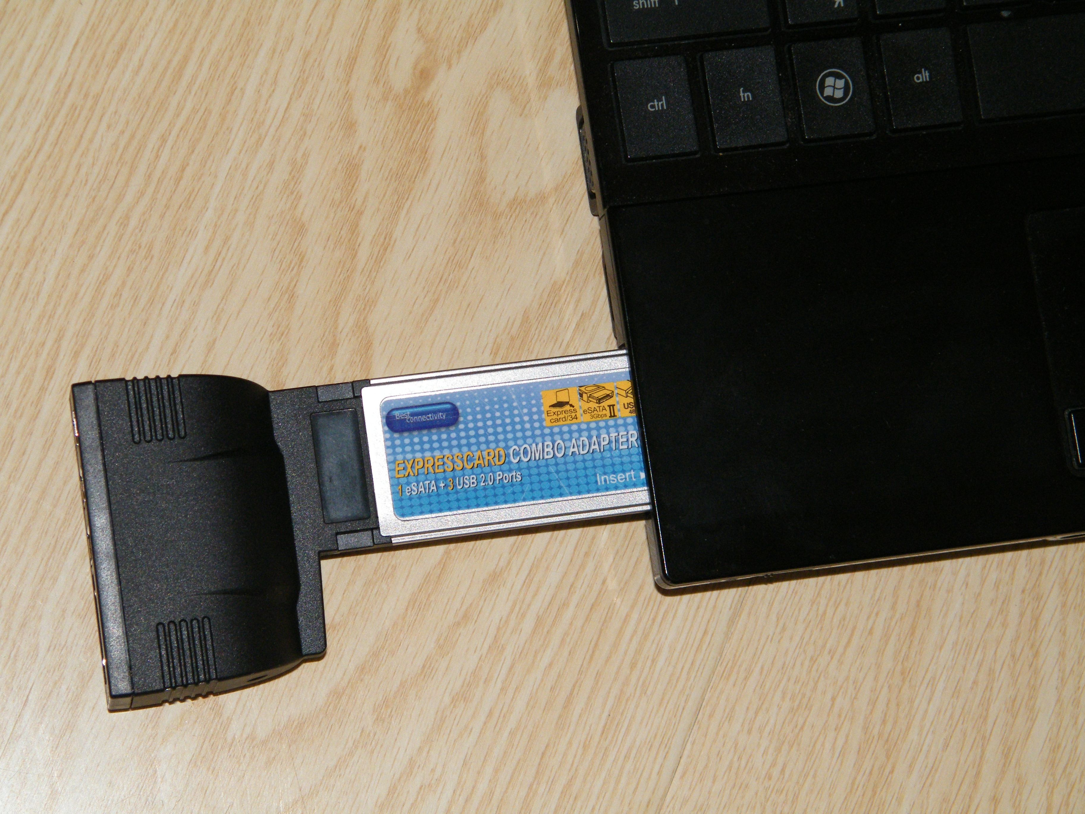 ExpressCard на 34 мм вставляется в ноутбук